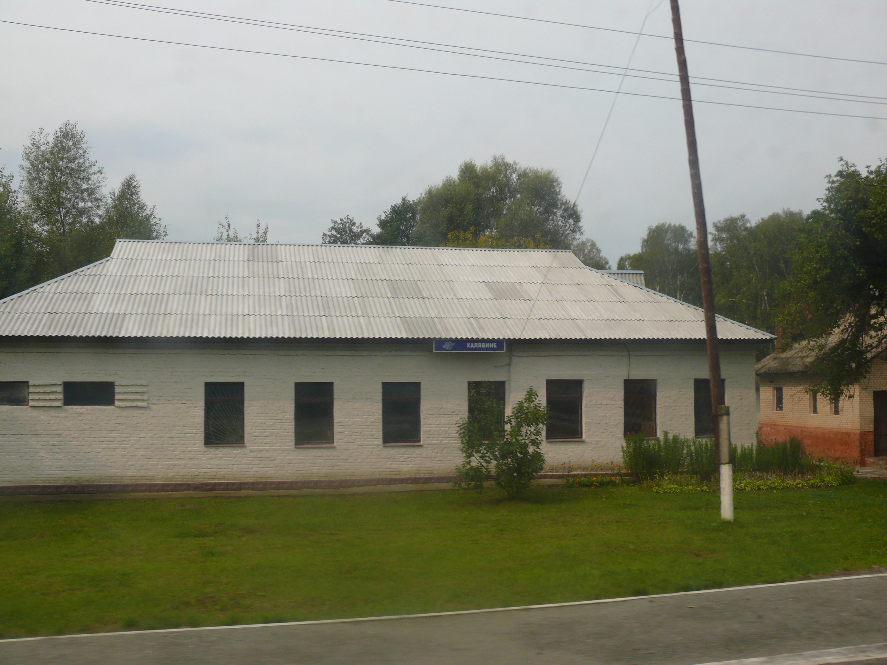 Станция Халявин. Черниговская область, Украина